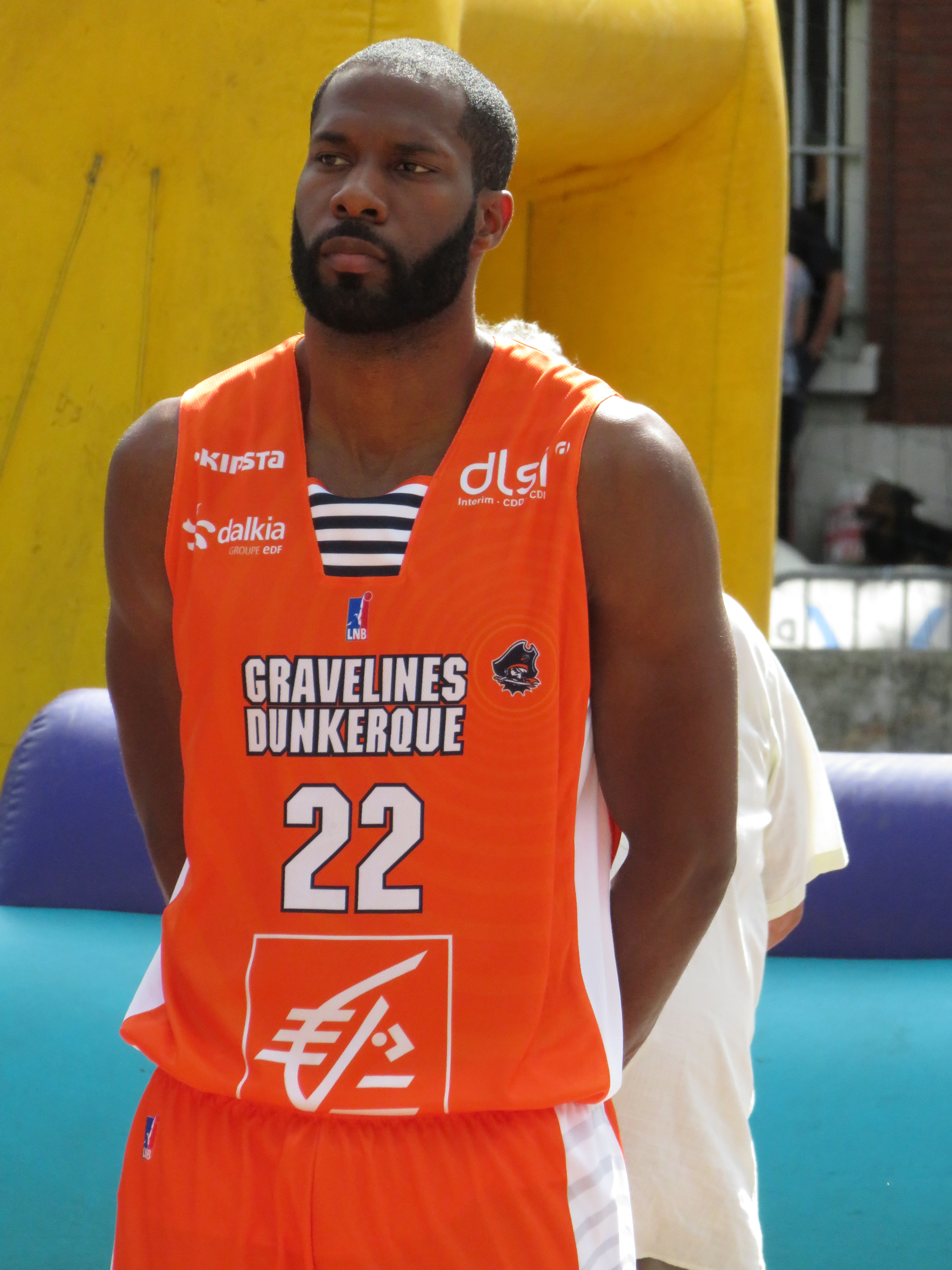 22 Kyle Gibson